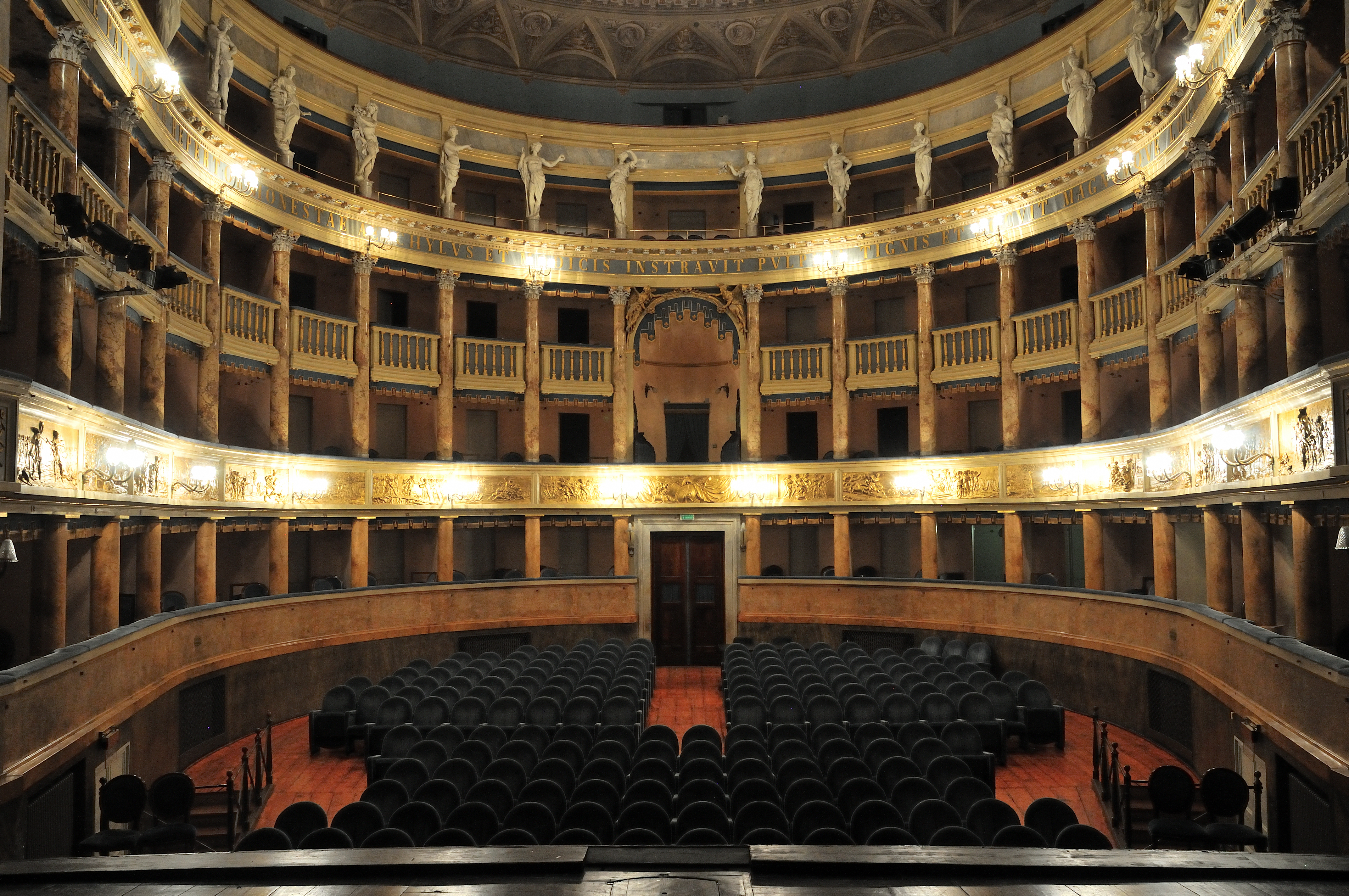 Teatro Comunale Angelo Masini - Comune di Faenza This is a photo of a monument which is part of cultural heritage of Italy.